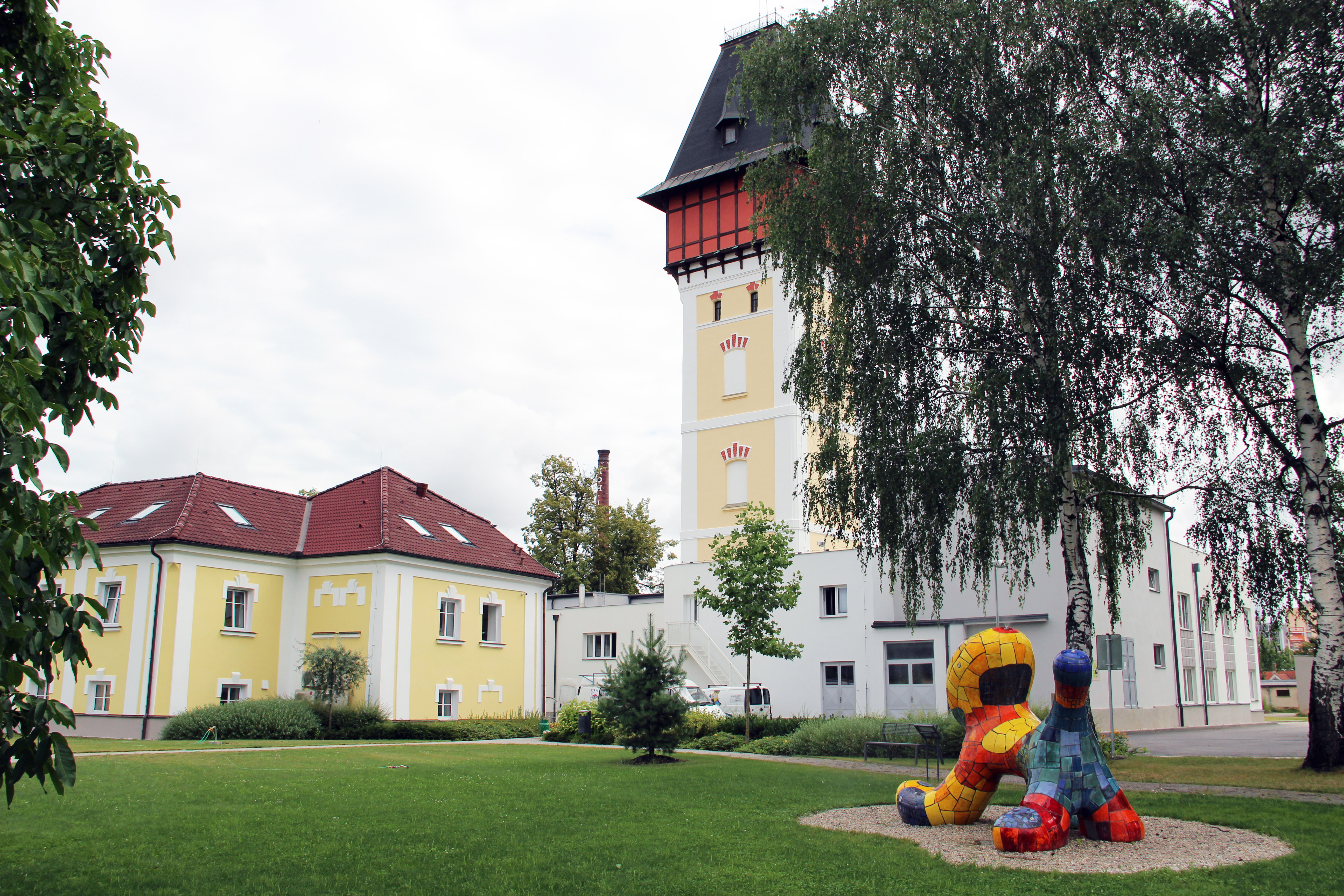 Areál Staré vodárny